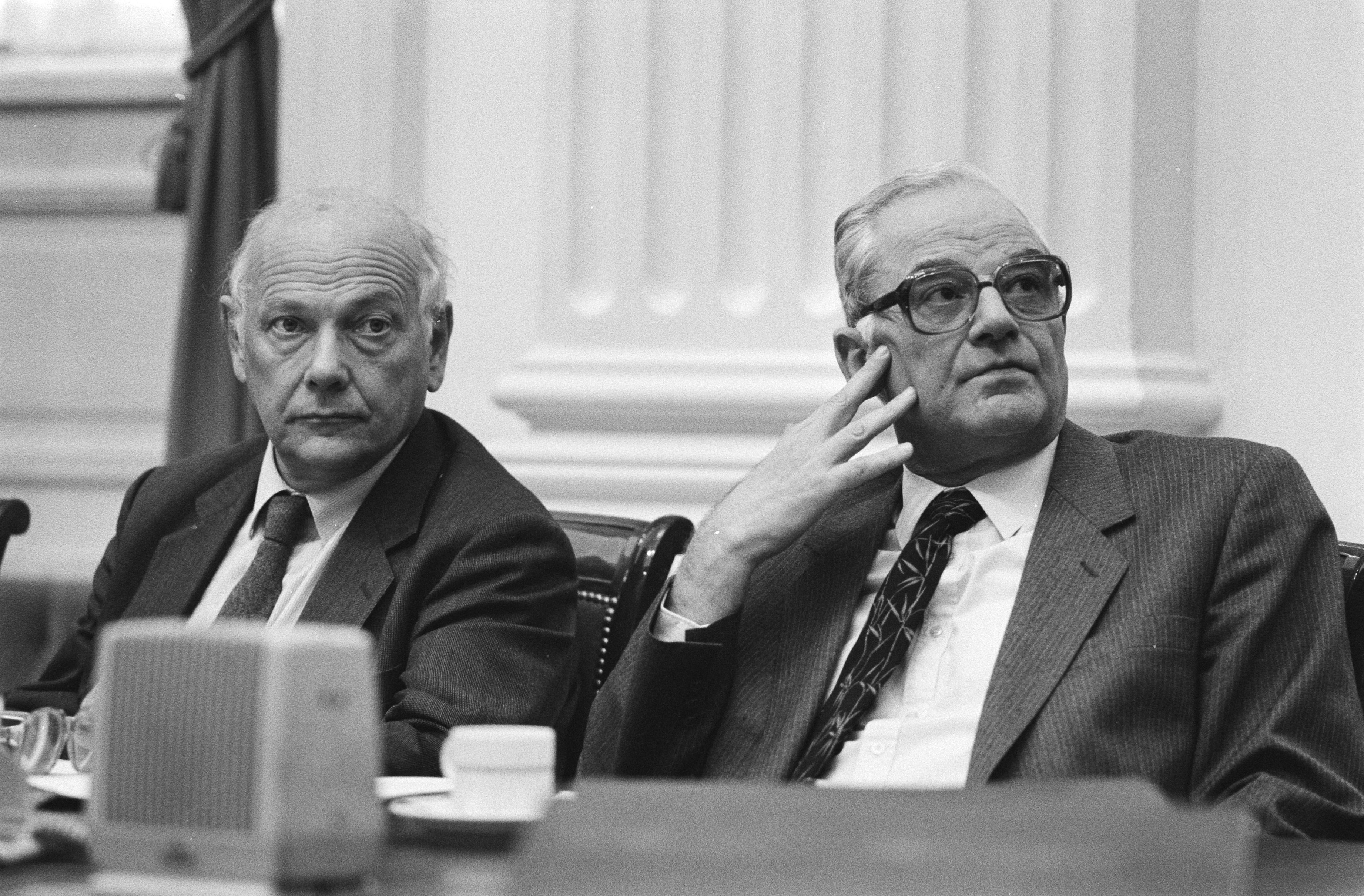 Collectie / Archief : Fotocollectie Anefo Reportage / Serie : [ onbekend ] Beschrijving : Tweede Kamer . Debat voorjaarsnota. Minister Den Uyl (l.) en Van de Stee tijdens debat Datum : 27 april 1982 Trefwoorden : politiek Persoonsnaam : Stee, Fons van der, Uyl, Joop den Fotograaf : Antonisse, Marcel / Anefo Auteursrechthebbende : Nationaal Archief Materiaalsoort : Negatief (zwart/wit) Nummer archiefinventaris : bekijk toegang 2.24.01.05 Bestanddeelnummer : 932-1258